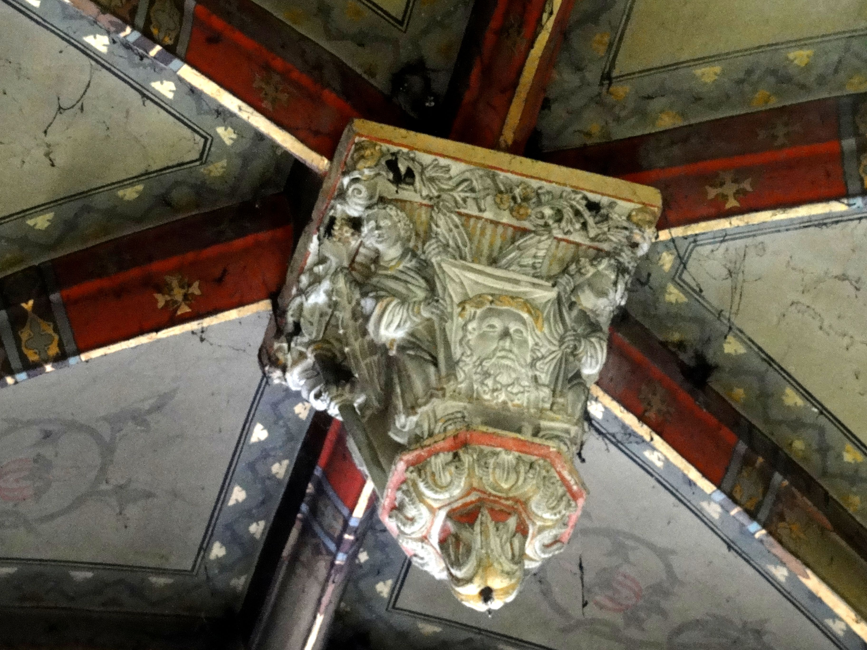 Clé de voûte de la chapelle de la cinquième travée du bas-côté nord.